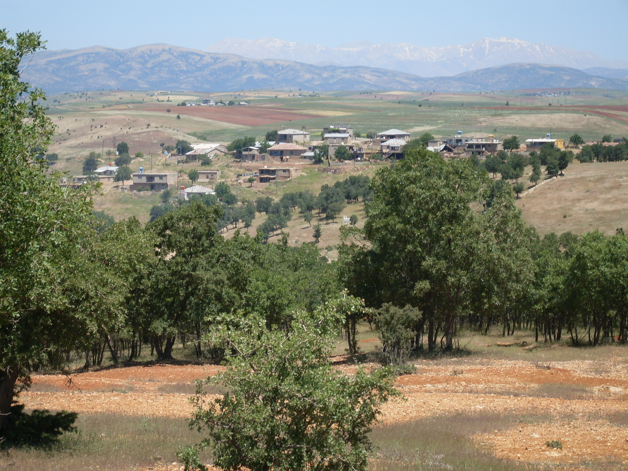 adıyaman haydarli